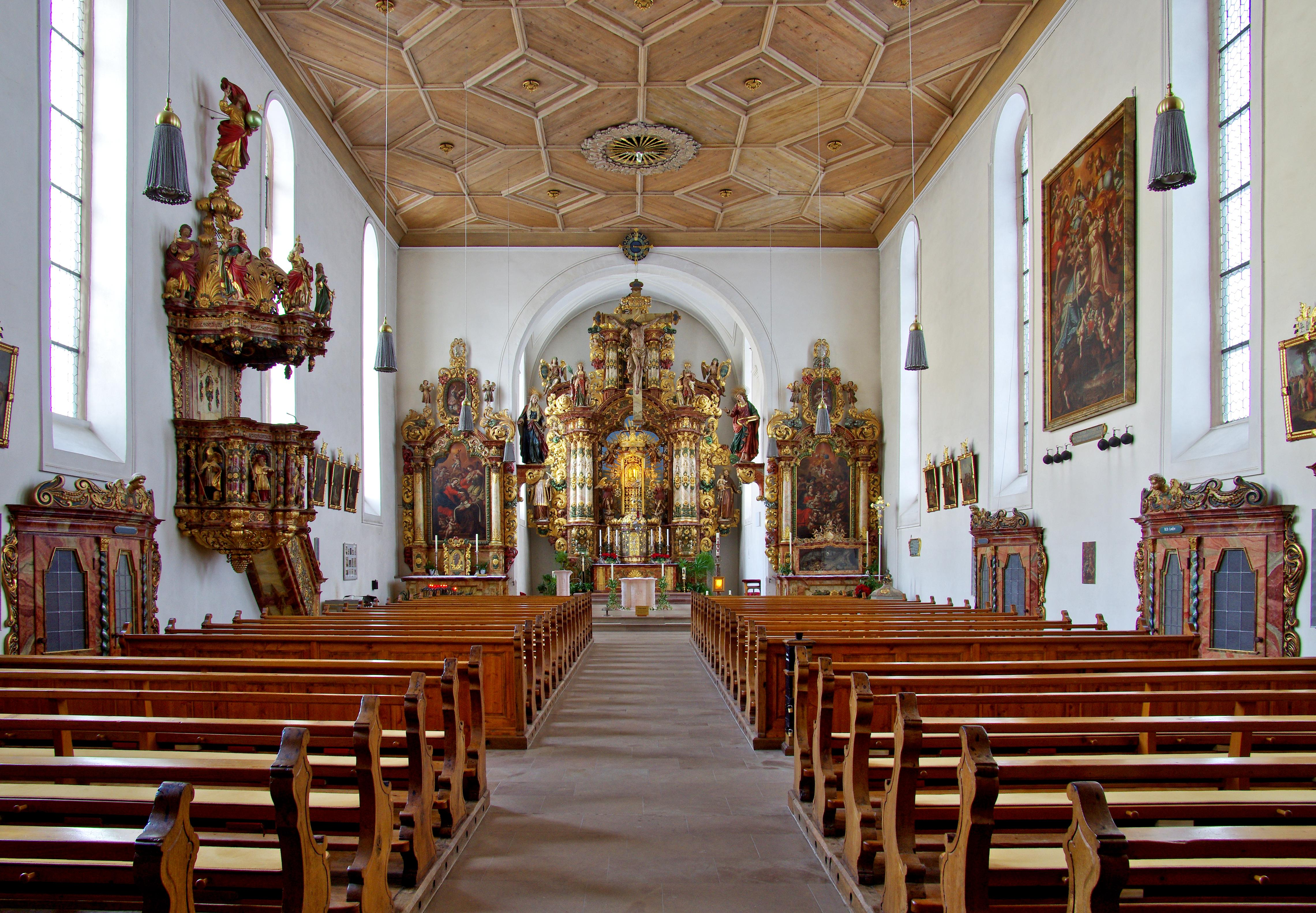 Bilder der Wallfahrtskirche "Maria in der Tanne" in Triberg Schwarzwald